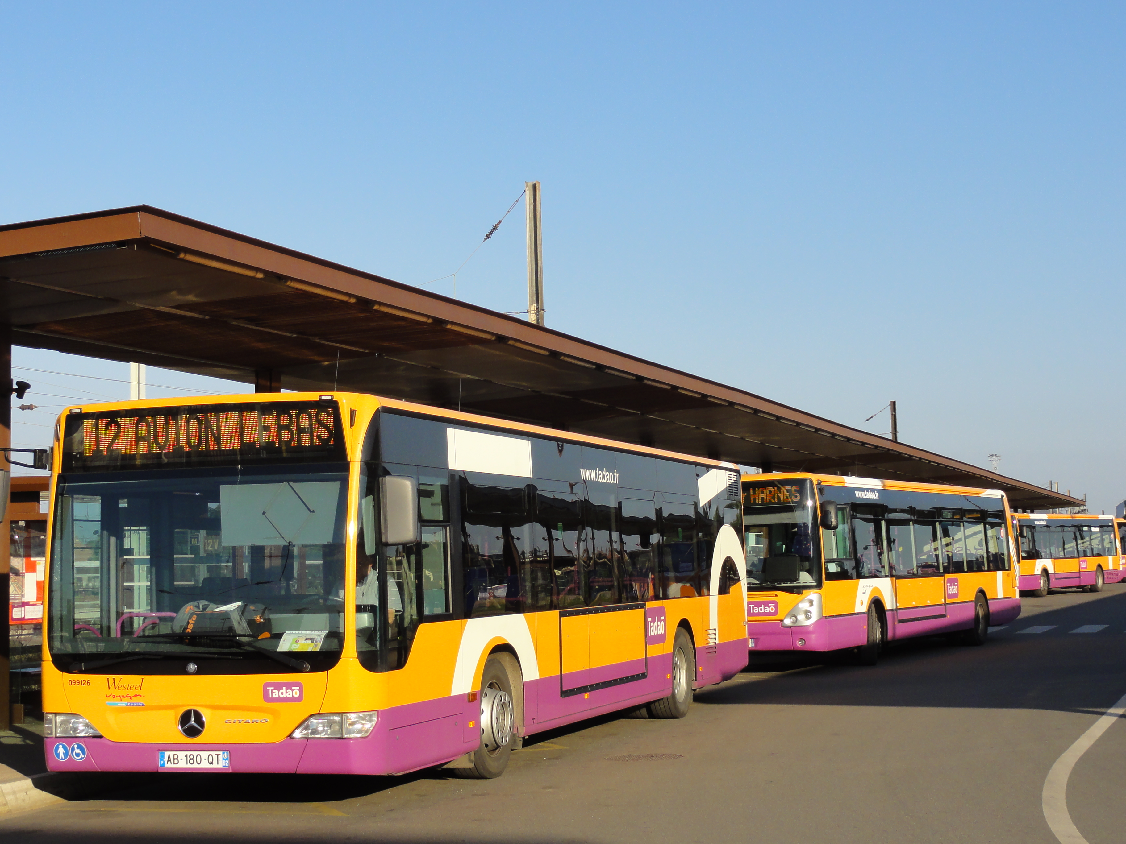 Tadao (écrit parfois Tadaō, avec un O macron) est la marque commerciale du réseau du syndicat mixte des transports Artois-Gohelle, qui, après quelques appels d'offres, a consenti une délégation de service public à Keolis Artois, dans le Pas-de-Calais en France. Keolis Artois gère le réseau de transport en commun des agglomérations de Lens-Liévin (CALL), d'Hénin-Carvin (CAHC), de l'Artois (Artois Comm) et de Nœux et environs (CCNE) ; soit 114 communes, et une population de quelque 610000 habitants. Créé en 2003, le réseau est le septième périmètre de transport urbain de France et le second de la région Nord-Pas-de-Calais.